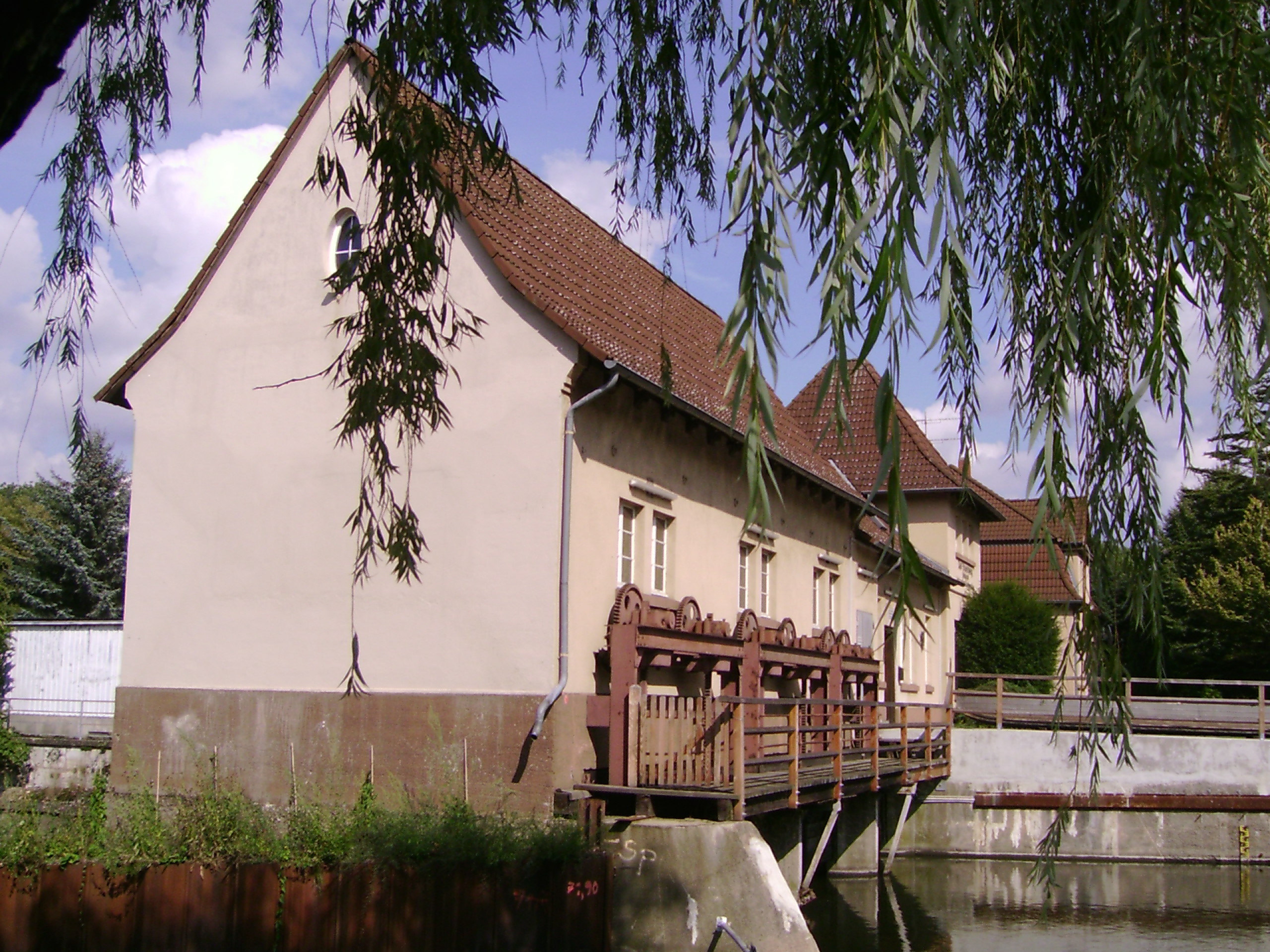 Das ehemalige Wasserkraftwerk bzw. Wassermühle in Eisenbüttel bei Braunschweig